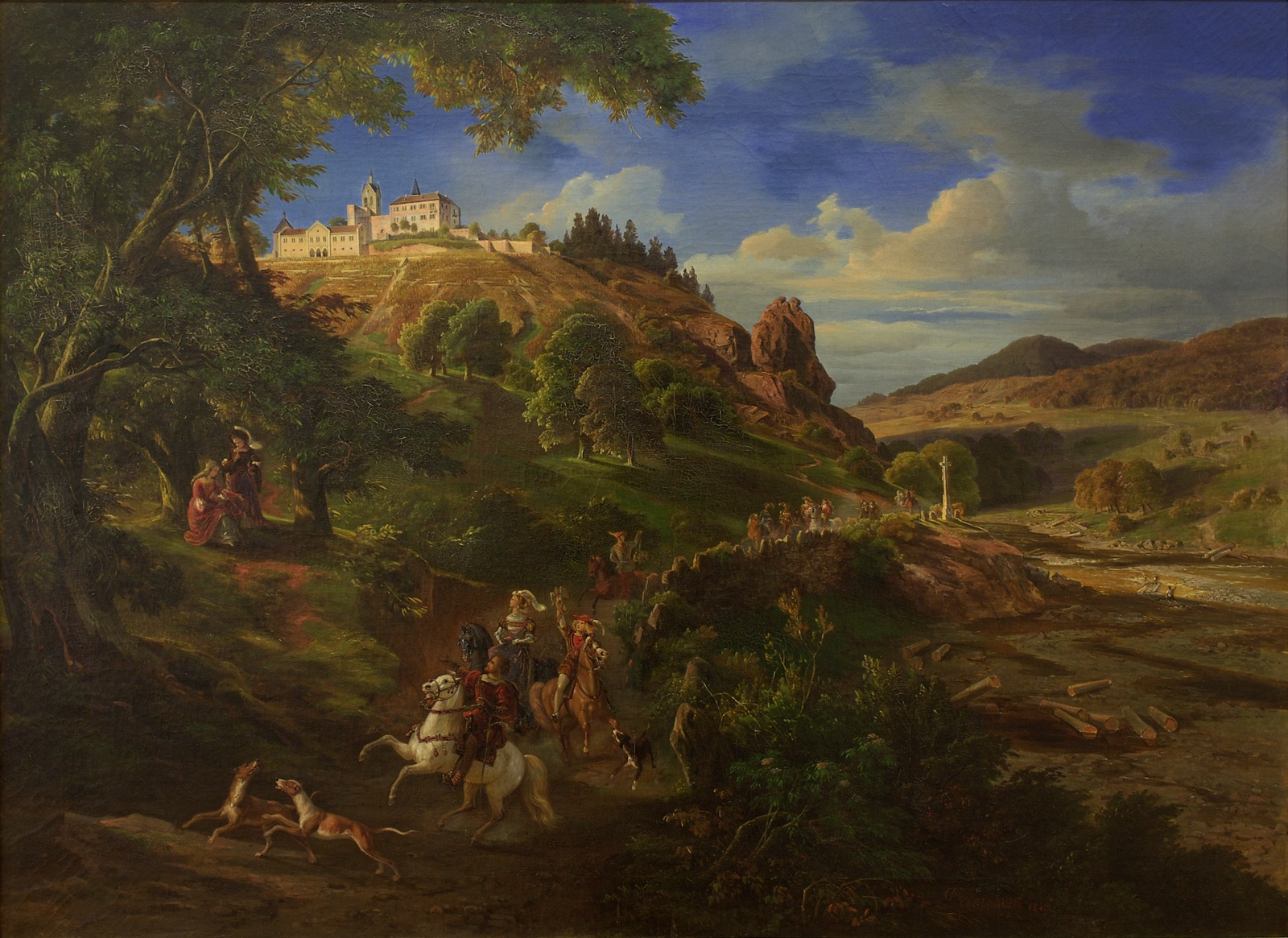 Schloss Neu-Eberstein bei Gernsbach im Murgtal mit mittelalterlichem Jagdzug